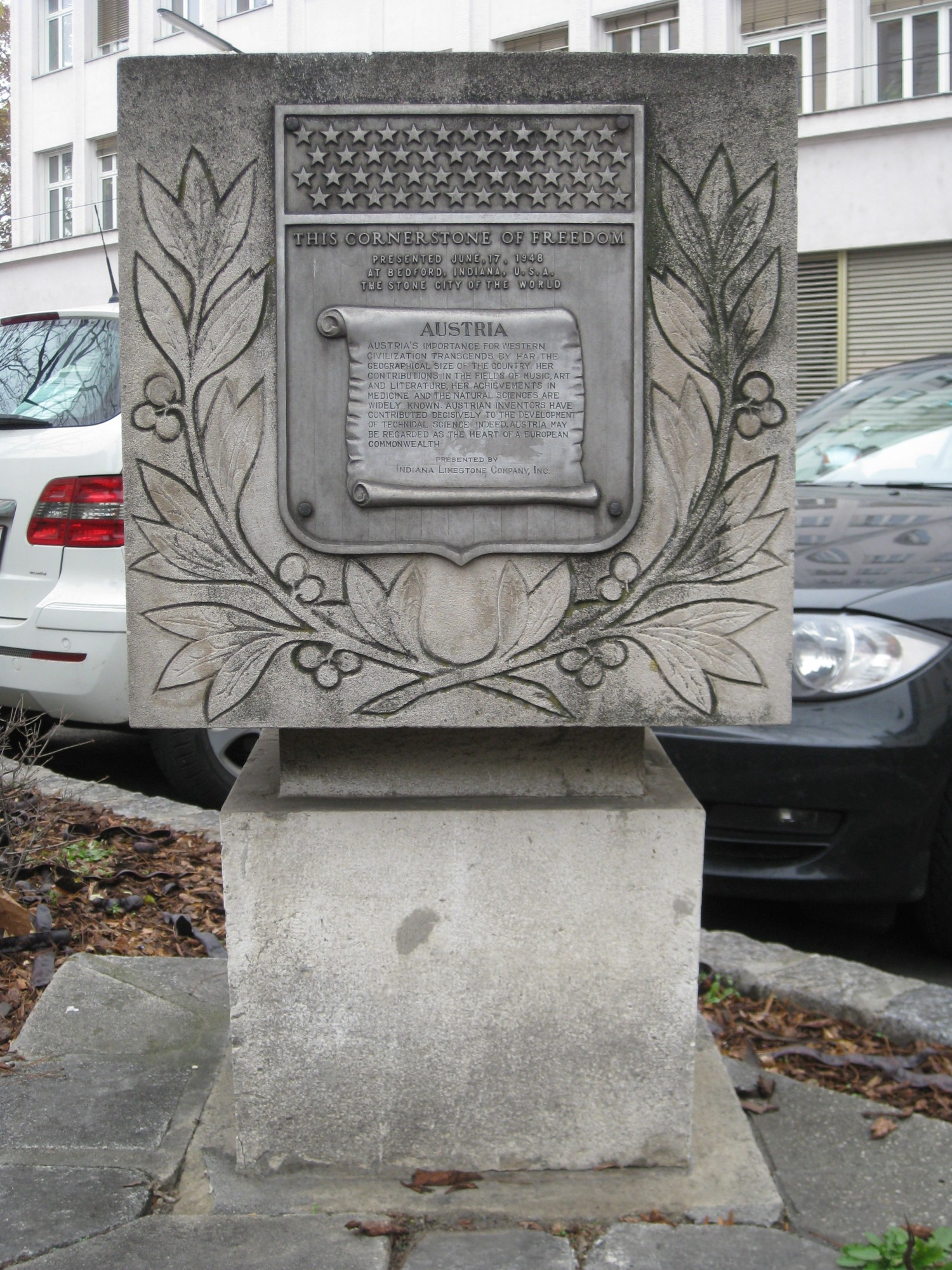 Der von den Amerikanern nach dem 2. WK. aufgestellte Cornerstone of Freedom am Frankhplatz in Wien-Alsergrund.